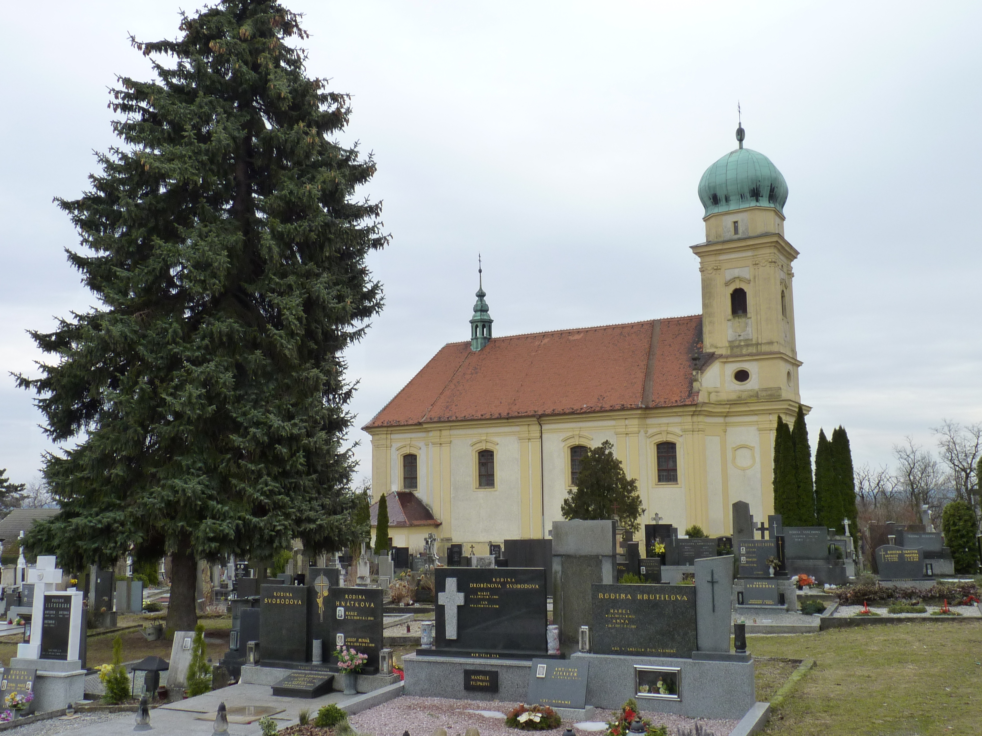 Kostel sv. Martina (Luleč), Luleč